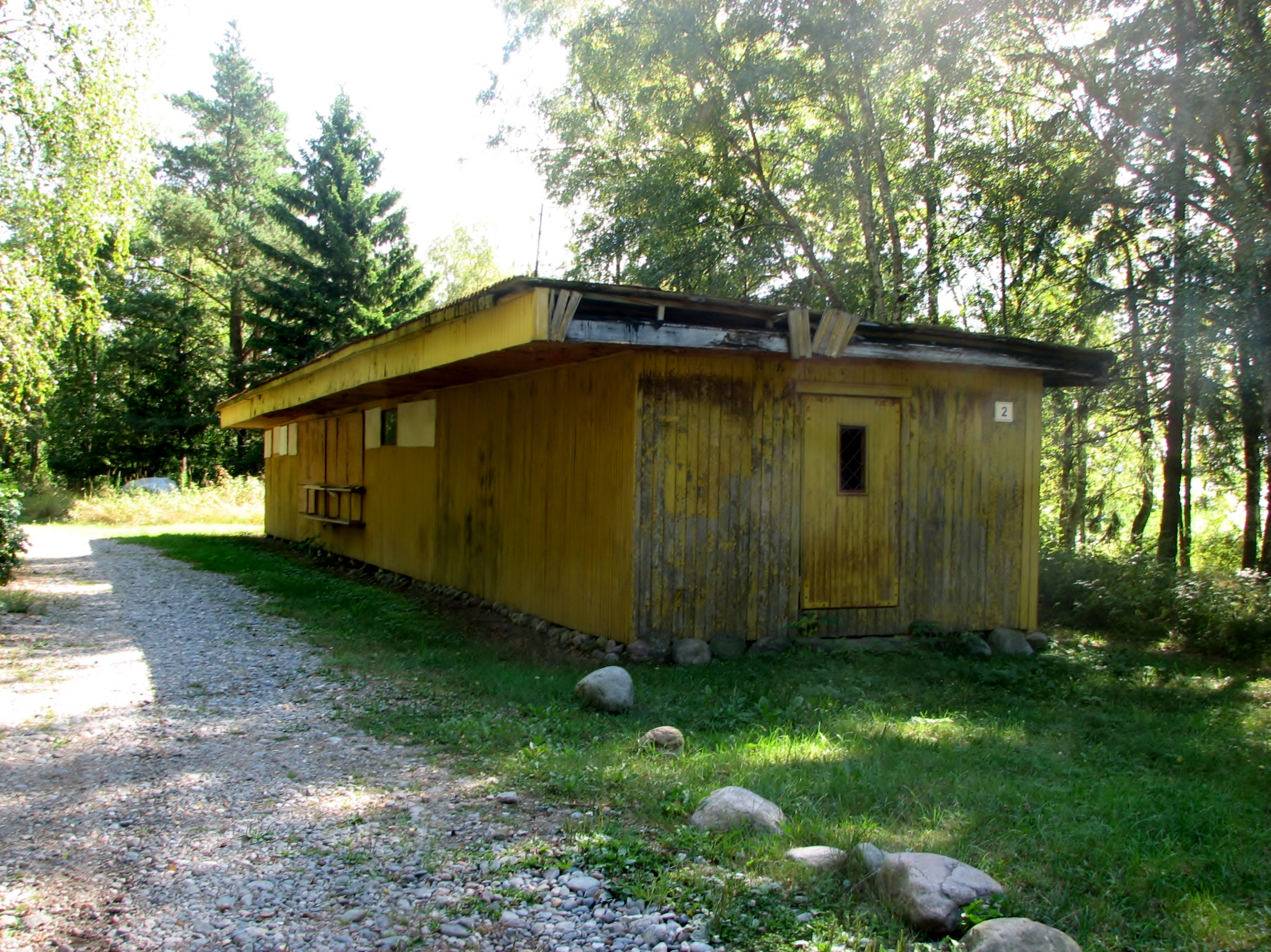 Aegna endine kauplus